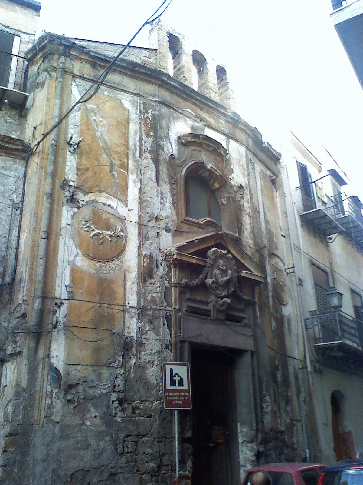 Palermo, Chiesa dei SS. Diecimila Martiri (inizi del XVIII secolo).